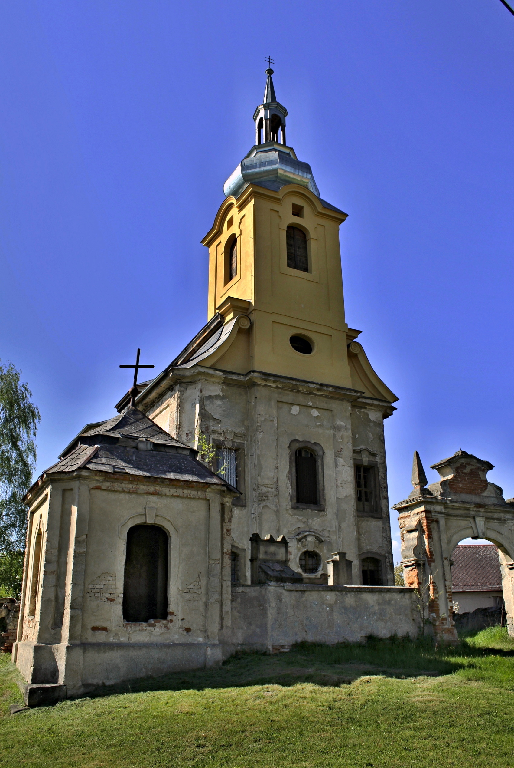 Obec Brenná u Zákup